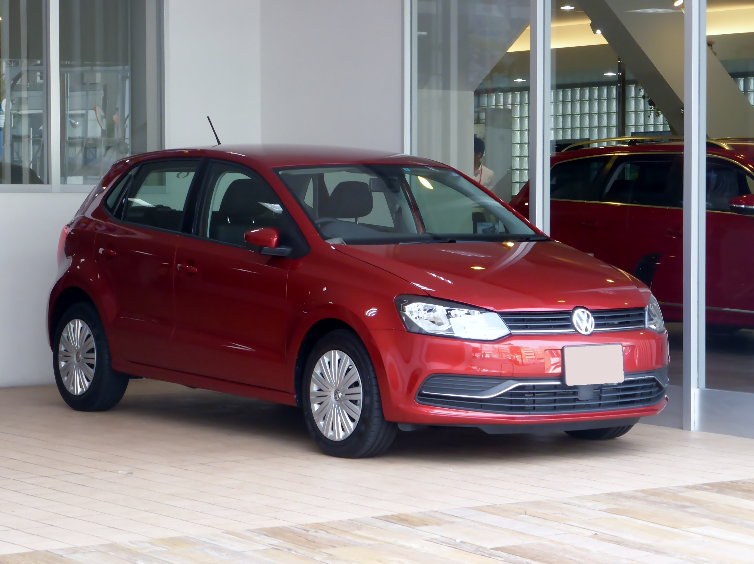 6R後期型フォルクスワーゲン・ポロTSIコンフォートラインをフロントから撮影。